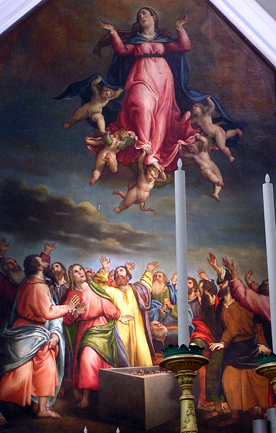 La foto rappresenta l'Assunzione di Lorenzo Lotto, pala d'altare dipinta intorno al 1549 per la chiesa di San Francesco alle Scale di Ancona.